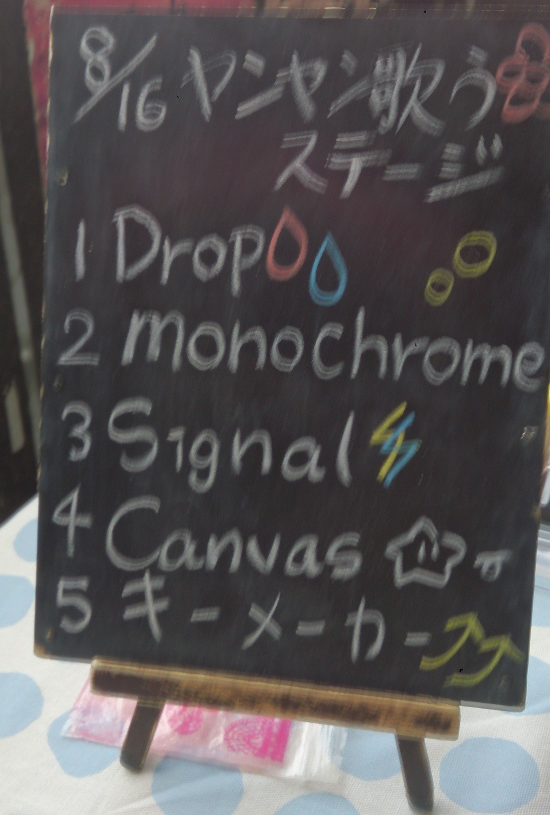 amiinaセトリボード(20150816(1))